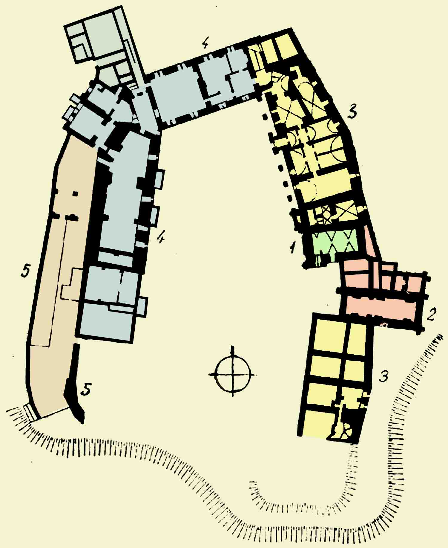 Zamek Piastowski w Raciborzu - zrzut piwnic i murów obronnych-części i etapy powstania budynku